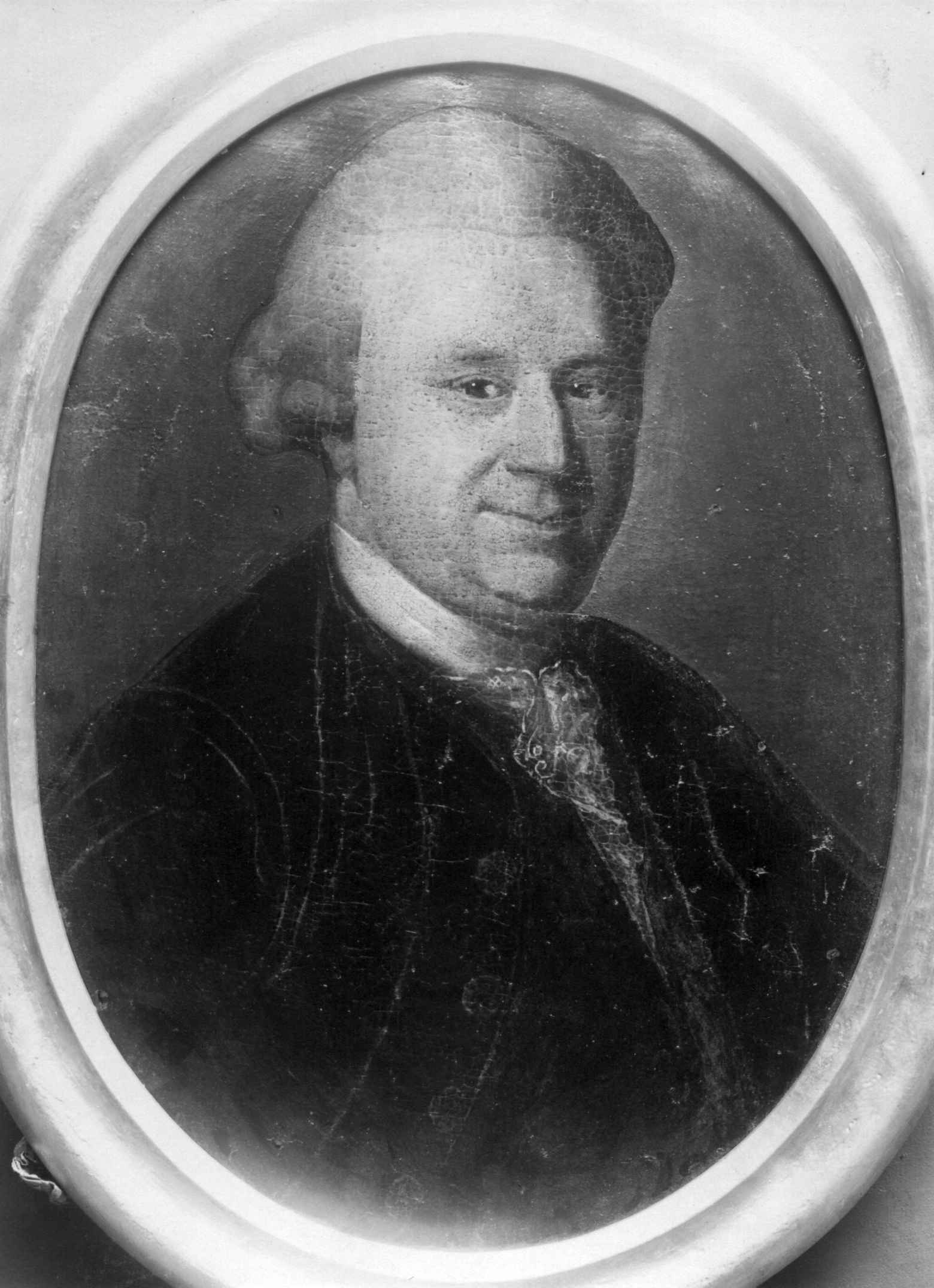 fotografi av et samtidig maleri som forestiller Jens Boalth (1725–1780), norsk teolog og skolemann, bl.a. stifter av Musikselskabet Harmonien (Bergen) i 1765